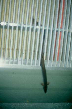 Ethohydraulik